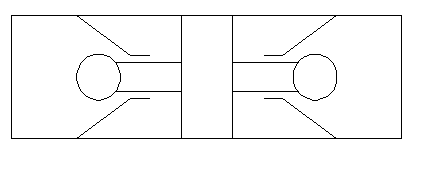 Один из возможных вариантов условного графического обозначения гидрозамка